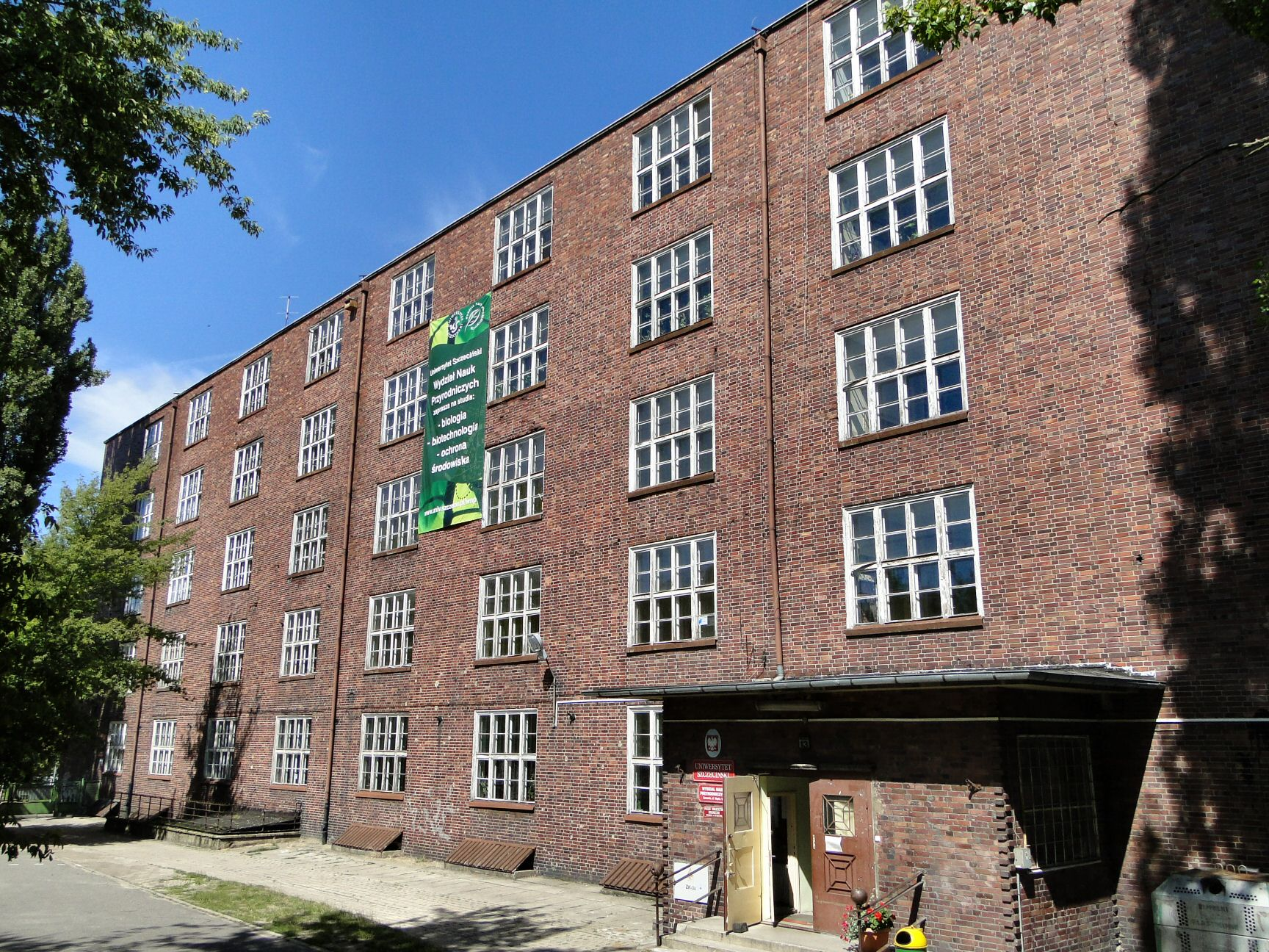 Siedziba Wydziału Nauk Przyrodniczych Uniwersytetu Szczecińskiego przy ulicy Wąskiej 13 w Szczecinie.